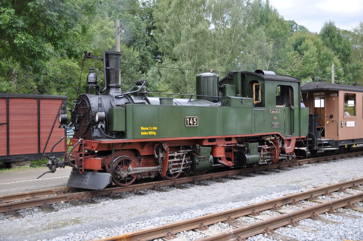 Lokomotive 99 555 im Bahnhof Lohsdorf, Schmalspurbahn Goßdorf-Kohlmühle–Hohnstein